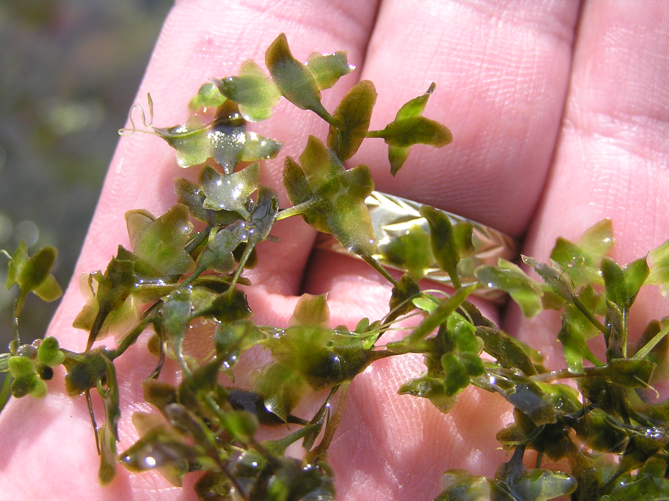 Lemna trisulca, Choceň, Czech Republic